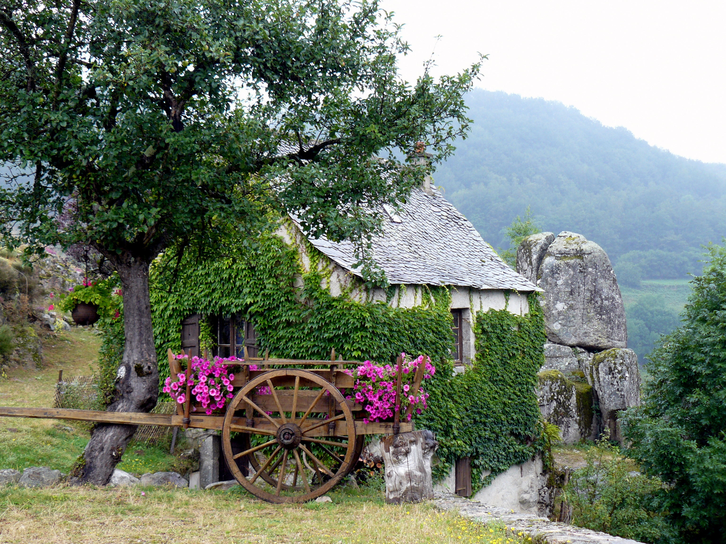 Site de Bez-Bédène (Campouriez, Aveyron, France)